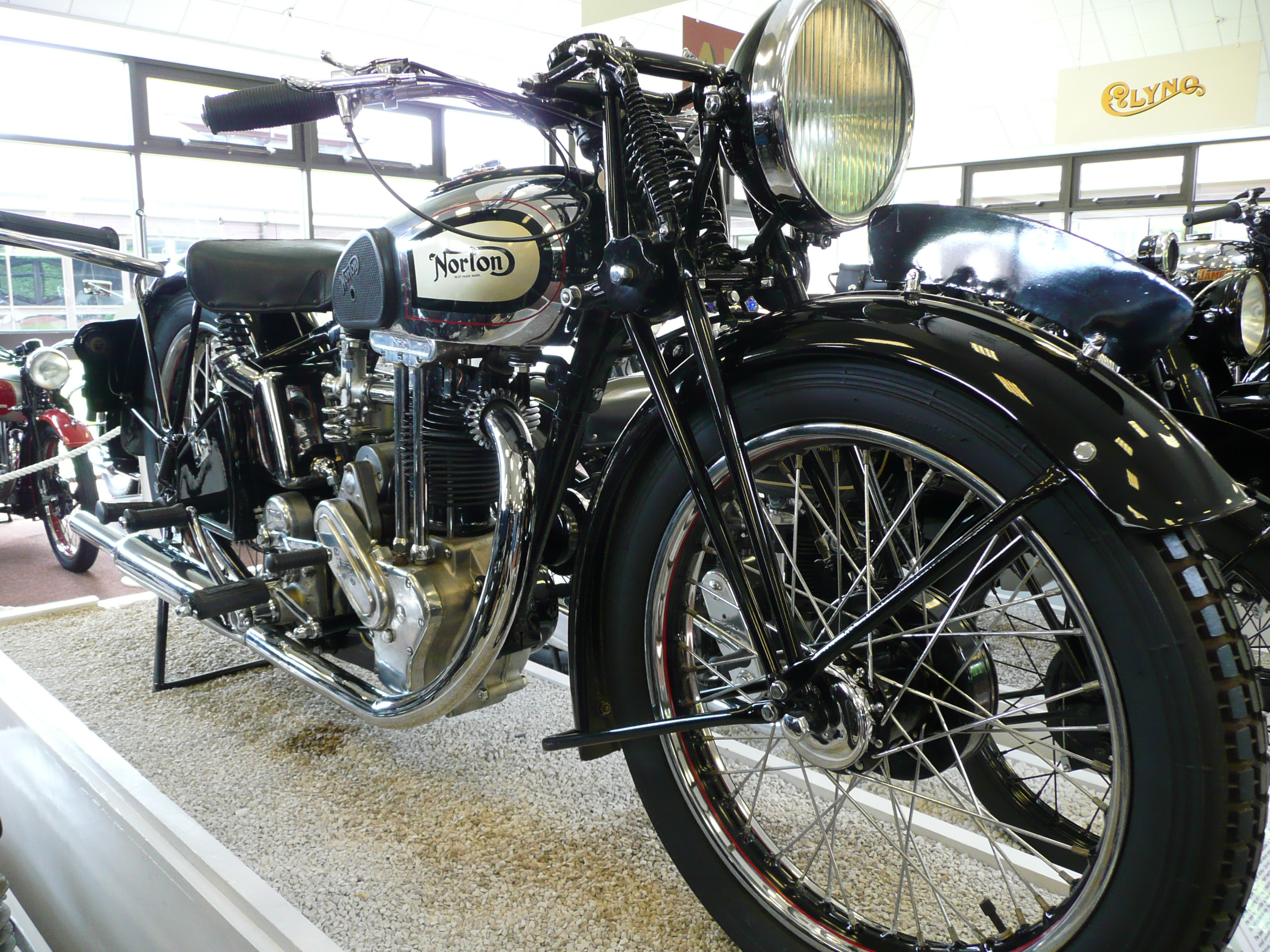 Norton 350cc Model 50 1935